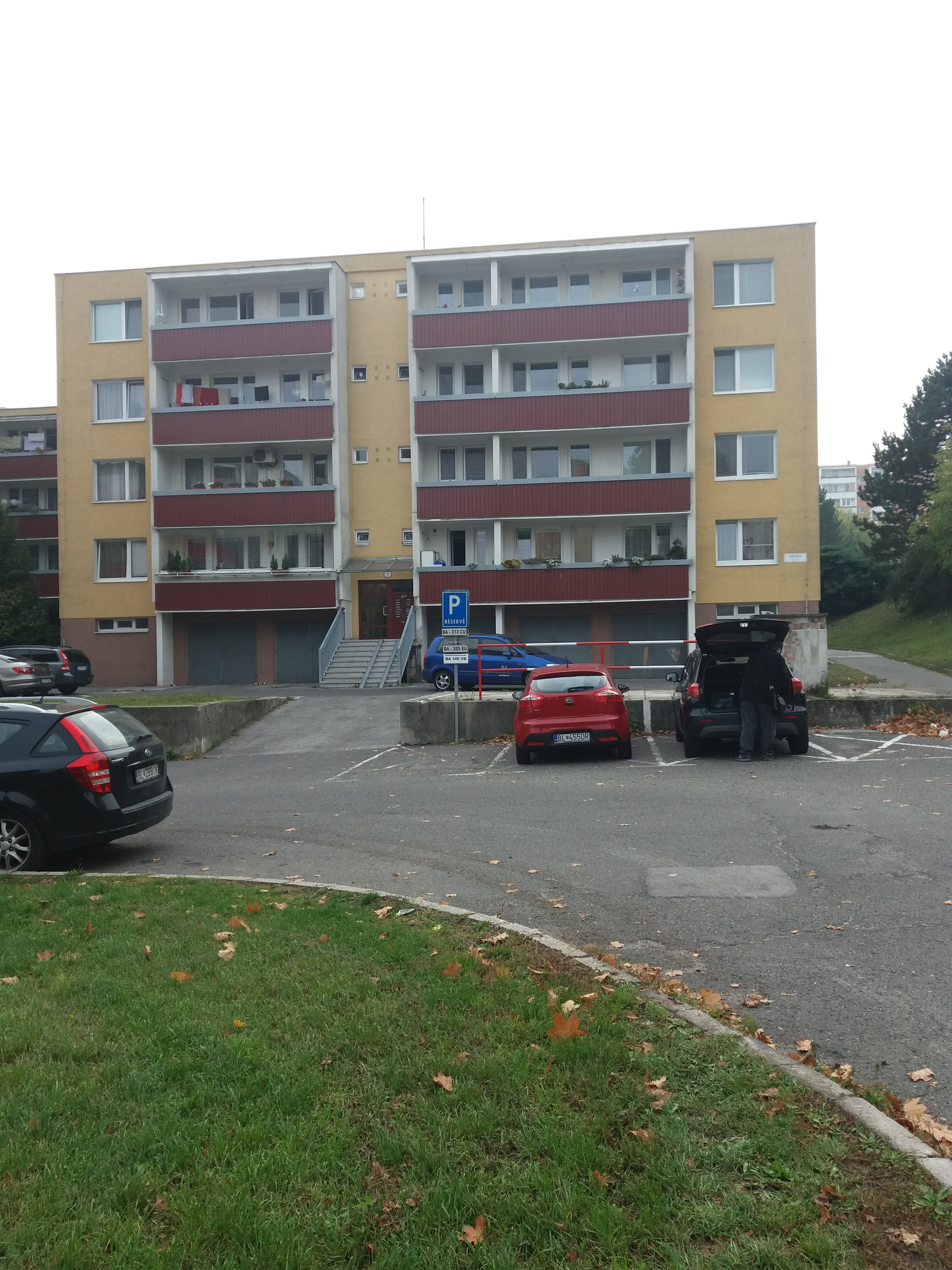 Panelák na Batkovej ulici